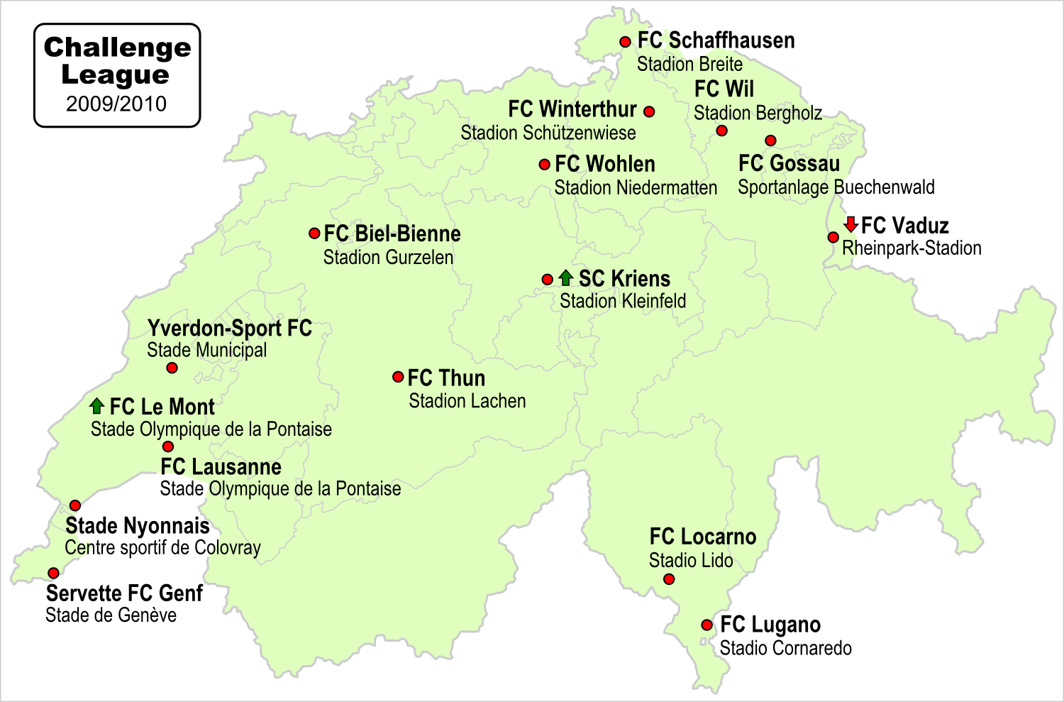 Karte der Vereine der Schweizer Challenge League 2009/2010